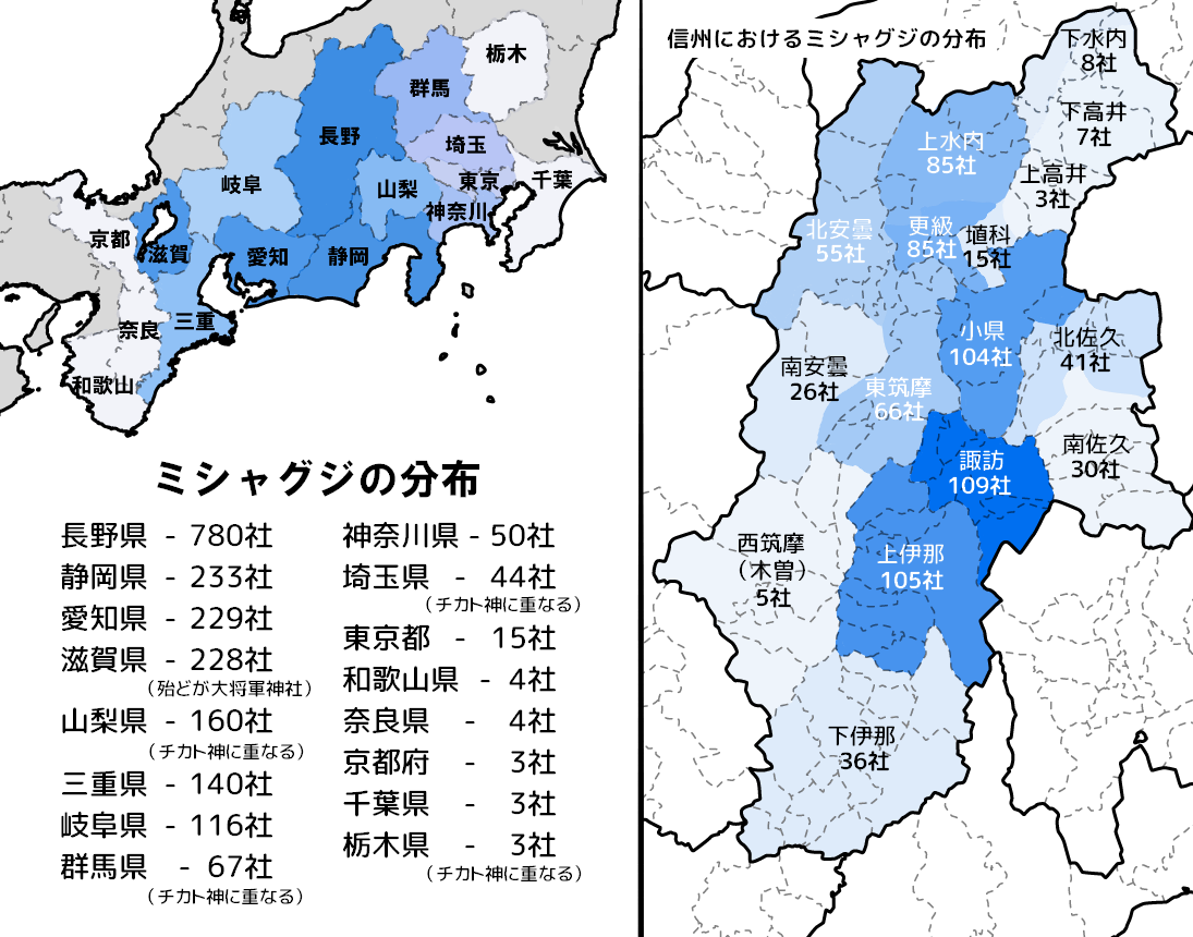 ミシャグジの分布（今井野菊「御社宮司の踏査集成」に基づく）